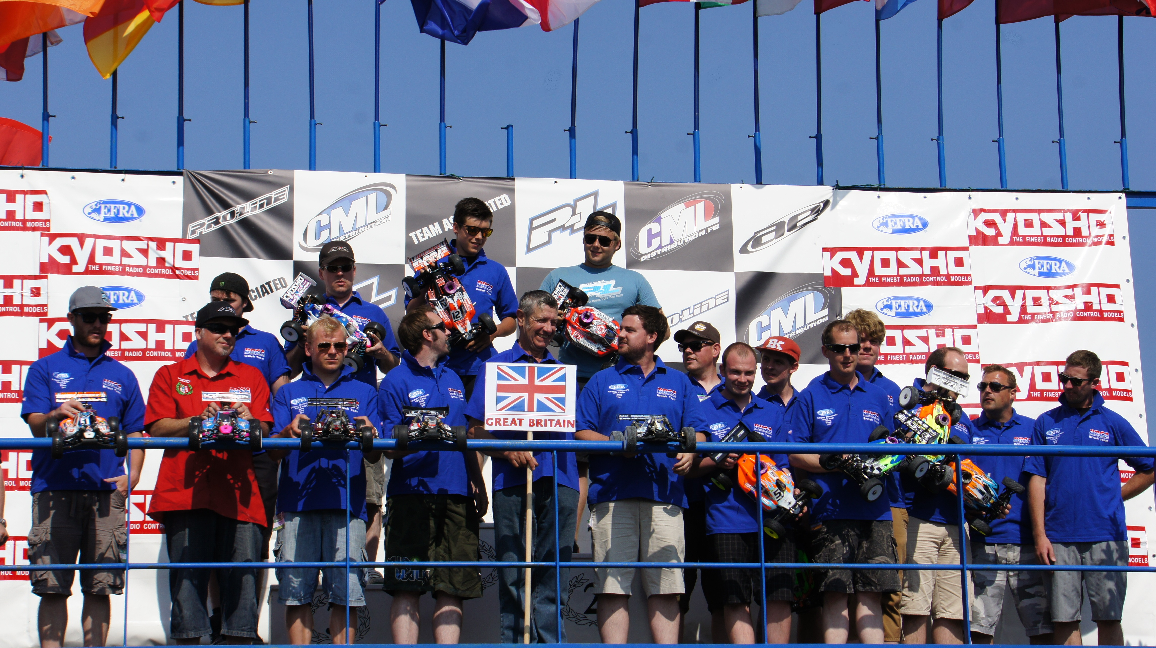 Lors du Championnat d'Europe EFRA 2013 à Reims.